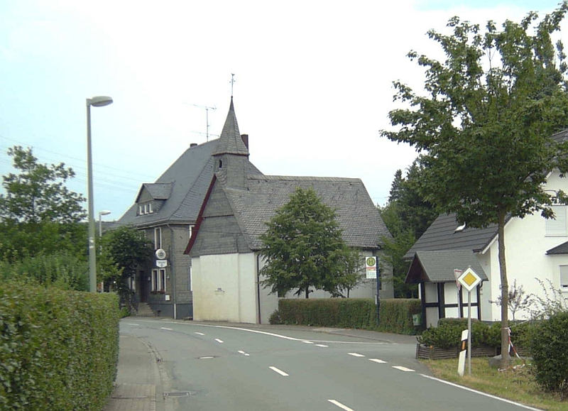 Kapelle in Niederberndorf (Schmallenberg), Germany.